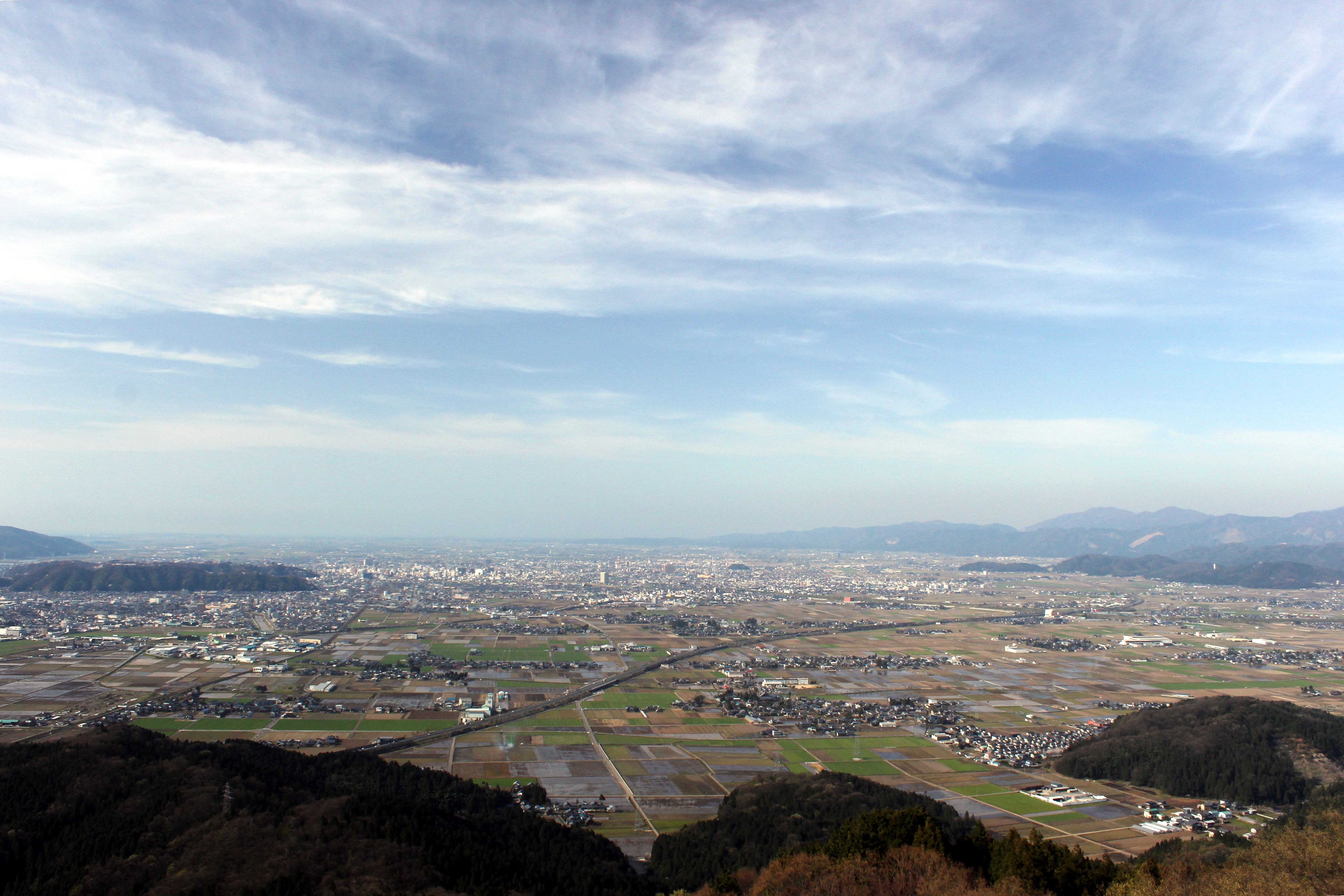 文殊山より北に福井平野望む。